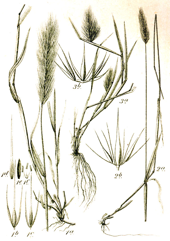 1. Hordeum murinum L. 2. Hordeum secalinum Schreb. 3. Hordeum marinum Huds., syn. Hordeum maritimum Stokes ex With., nom. ill. Original Caption 1. Mäuse-Gerste, Hordeum murinum L. 2. Roggen-Gerste, H. secalinum Schreb. 3. Strand-Gerste, H. maritimum With.